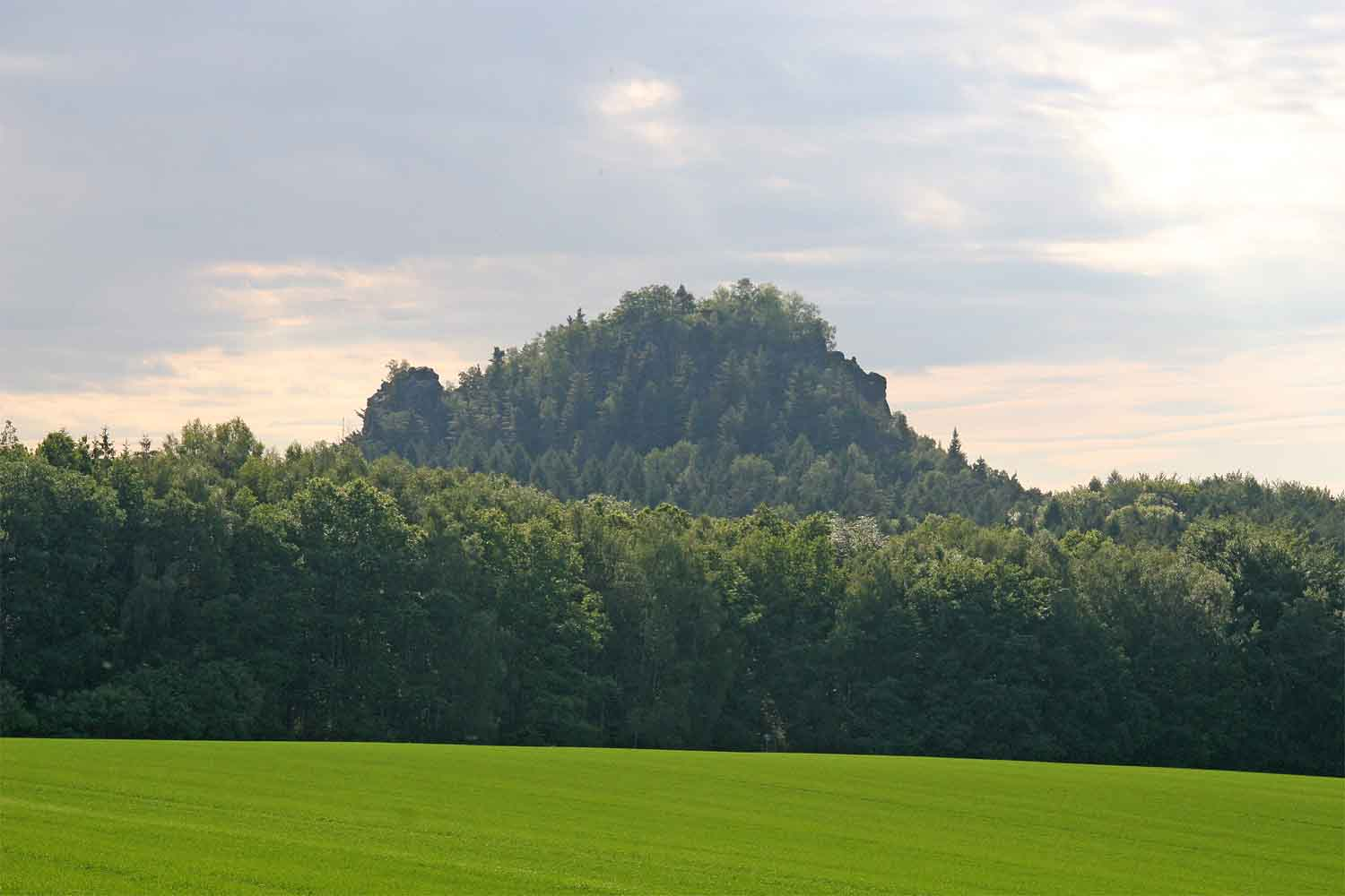 Stolová hora Kleiner Bärenstein od obce Weissig